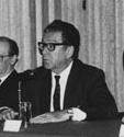 Víctor Urquidi